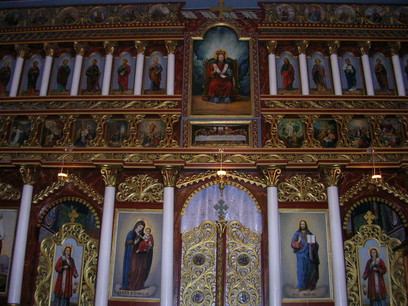 Iconostas (foto Oblio)